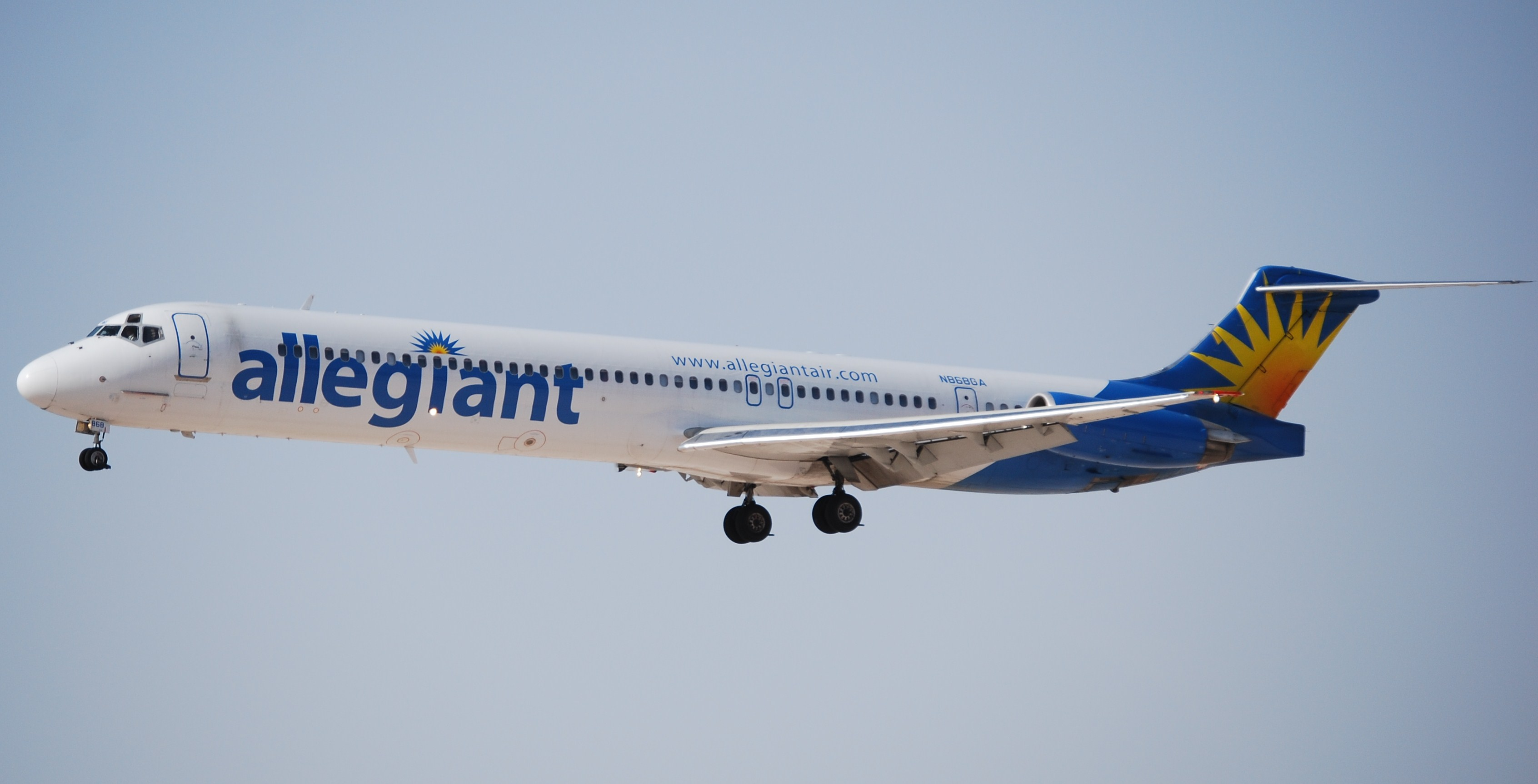 ALLEGIANT AIR